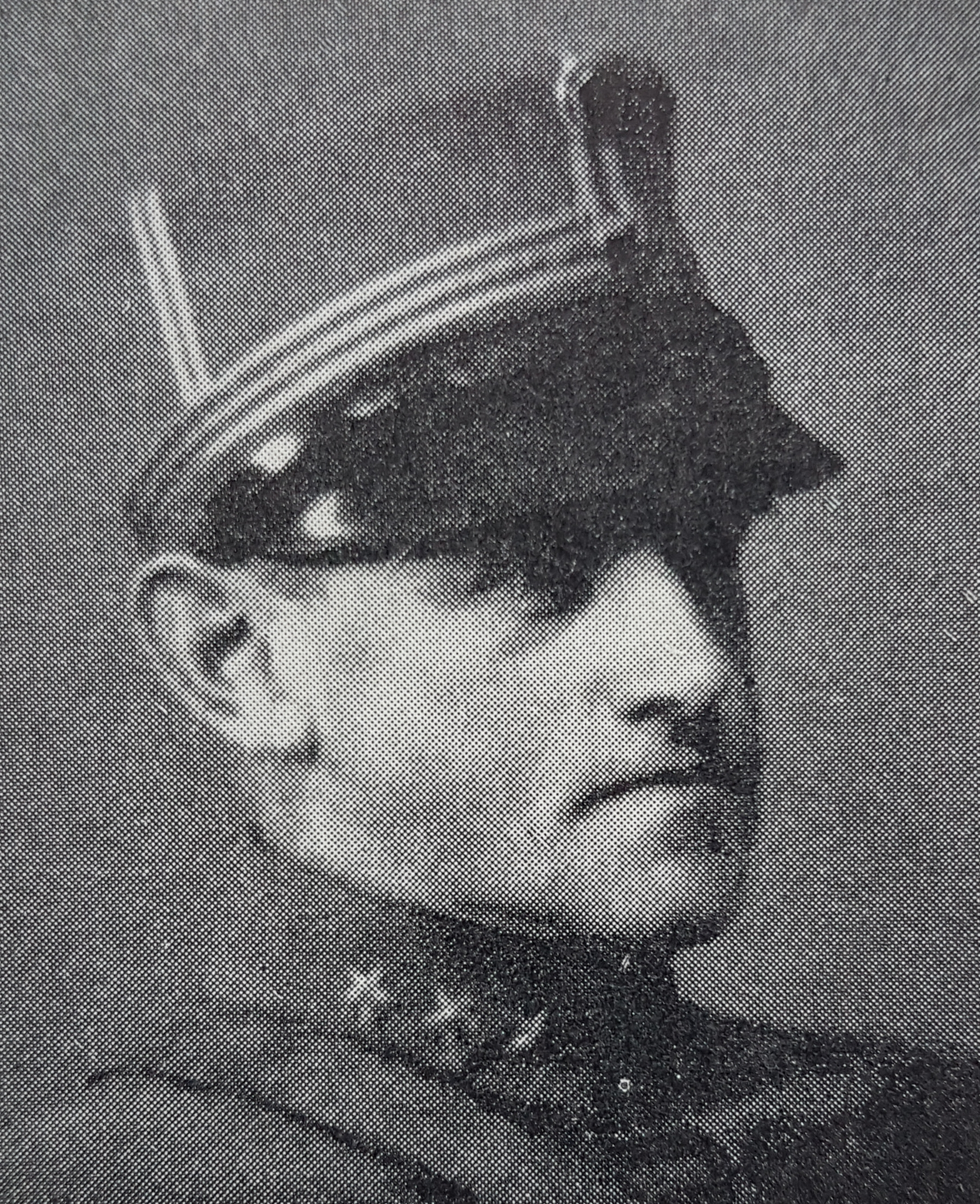 Herman Willoch